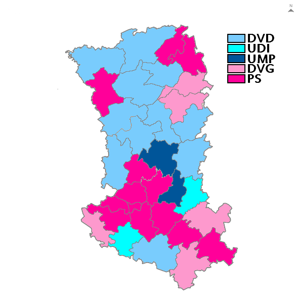 Cantons Deux-Sèvres depuis 2011